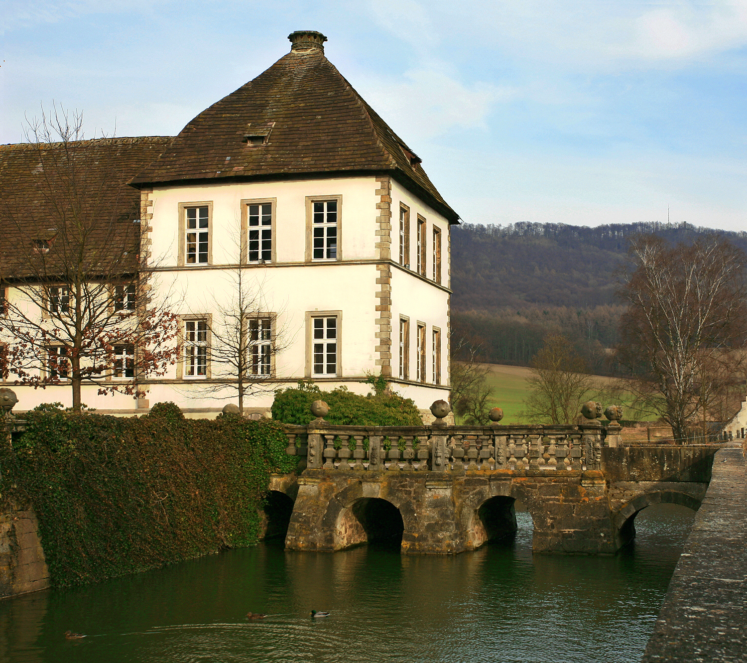 Detailansicht vom Schloss in Bisperode